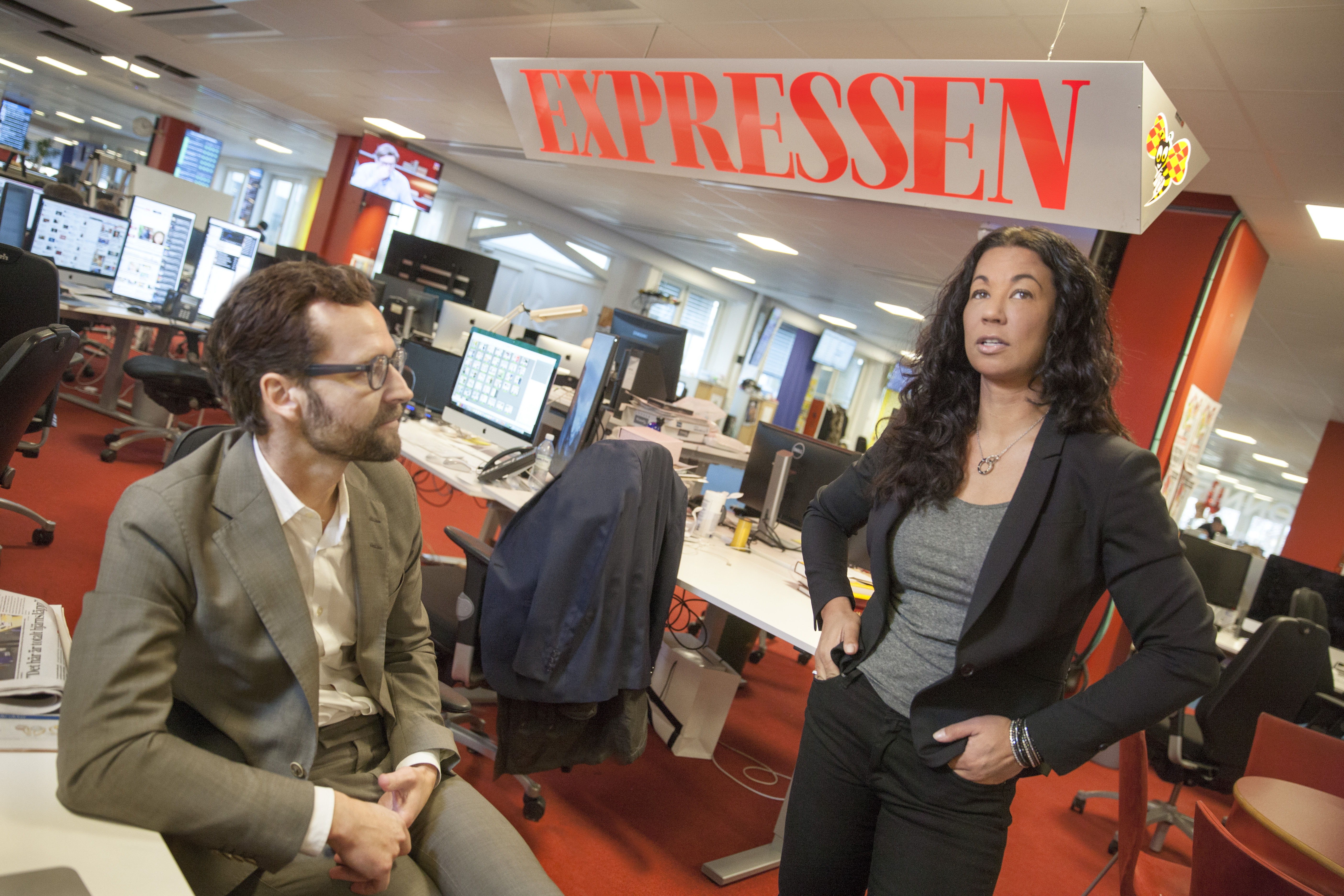 Den svenska journalisten Magda Gad.